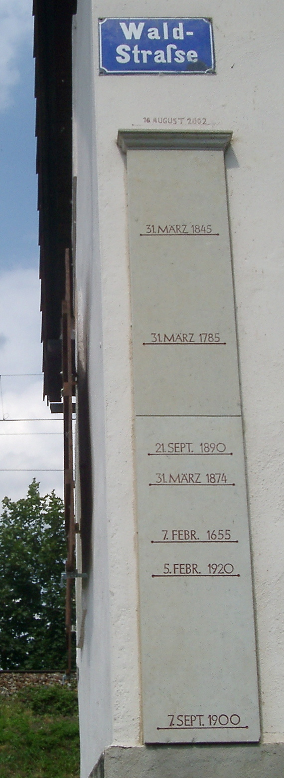 Hochwassermarken in Pirna 1655 bis 2002 Hinweis: Die Marke von 1785 ist falsch. Tatsächlich wurde dieser Wasserstand nicht Ende März 1785, sondern Anfang März des Vorjahres (1784) erreicht.